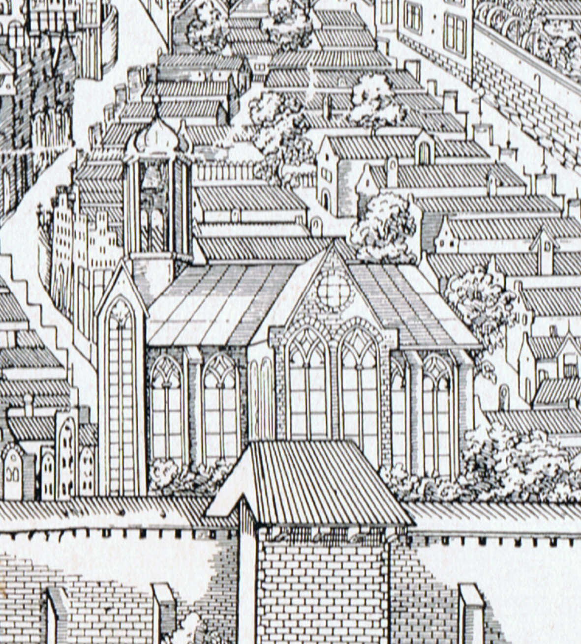 Die Kirche des St.-Johannis-Klosters in Lübeck, dargestellt auf der Lübecker Stadtansicht des Elias Diebel.